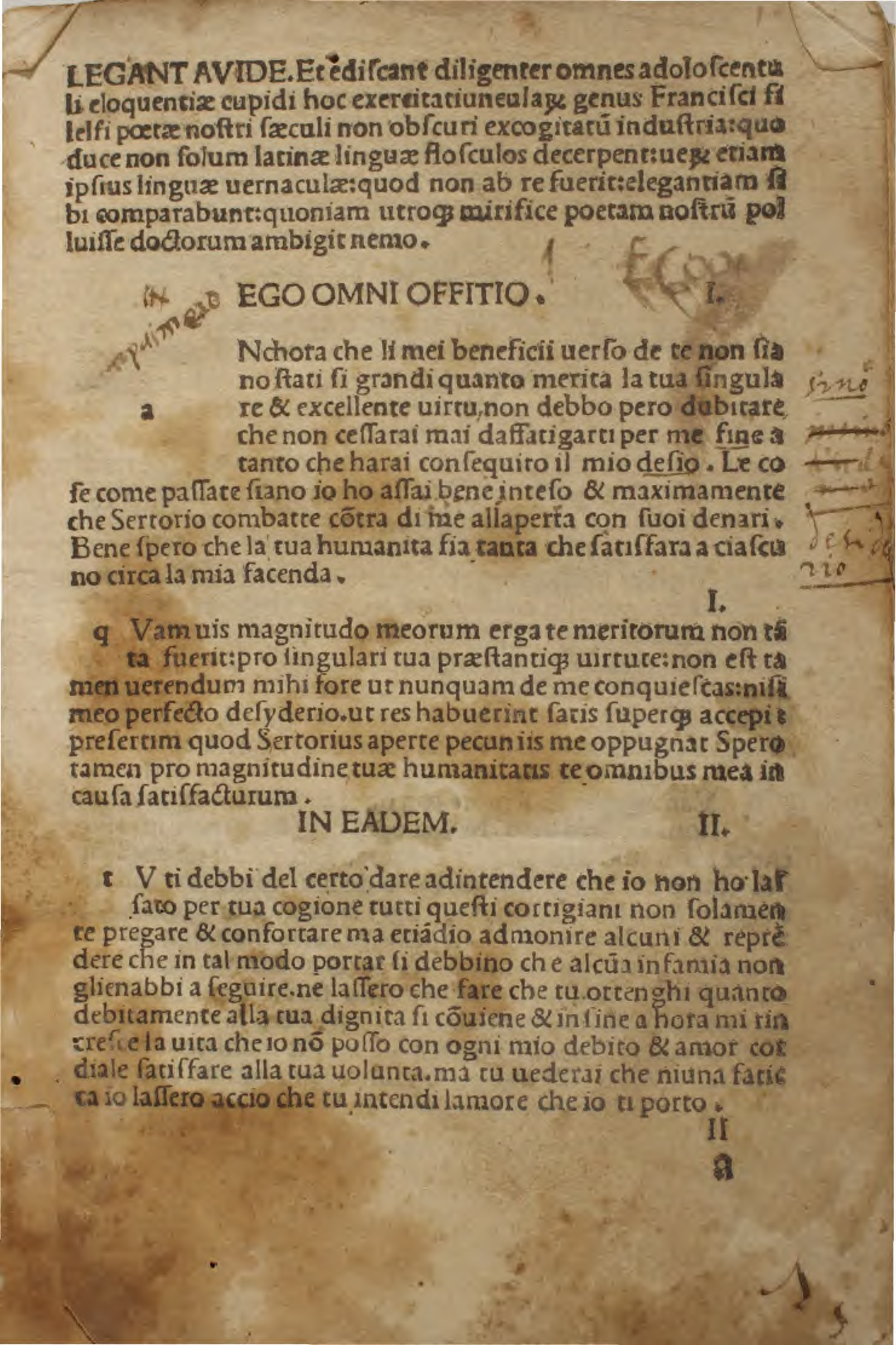 Exercitatiunculae (latino e italiano). - [Milano] : Impressum per Antonium Zarotum Parmensem, Anno domini MCCCCLXXXXVIII X februarii. - 52 c. ; a-f⁸, g⁴ ; 4° . Incipit: Legant avide